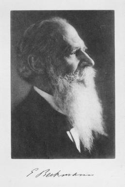 Ernst Otto Beckmann (* 4. Juli 1853 in Solingen; † 13. Juli 1923 in Berlin), Emeritierung Scan of a picture of German scientist Ernst Otto Beckmann (who died in 1923)